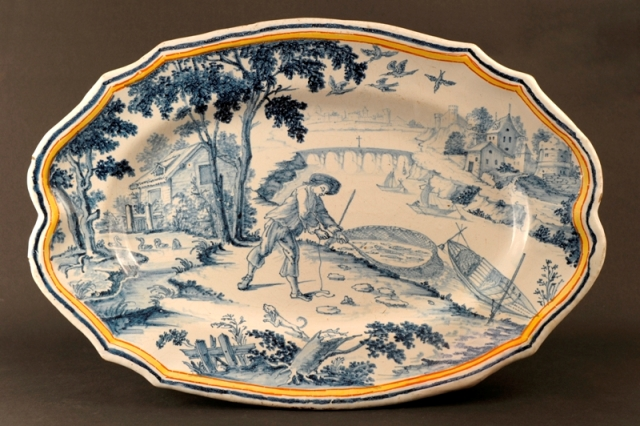 Plat décor au pêcheur, v. 1758, Faïence stannifère / Nevers / Claude Guillaume Bigourat. Bordeaux, musée des Arts décoratifs et du Design.